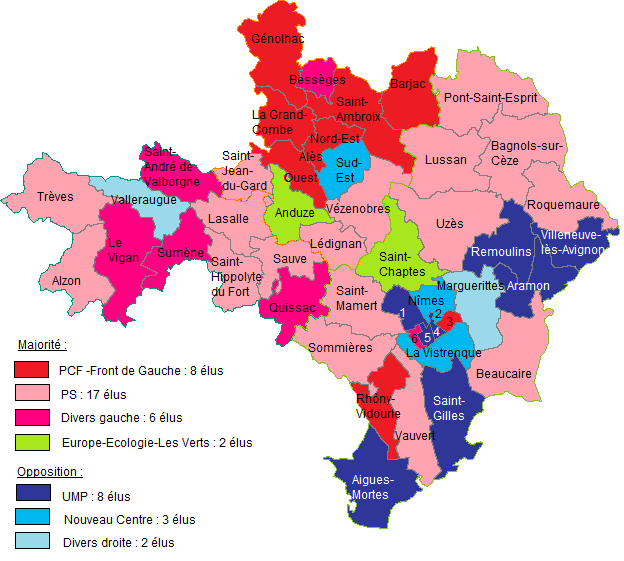 Carte des cantons du Gard suite aux élections cantonales de mars 2011